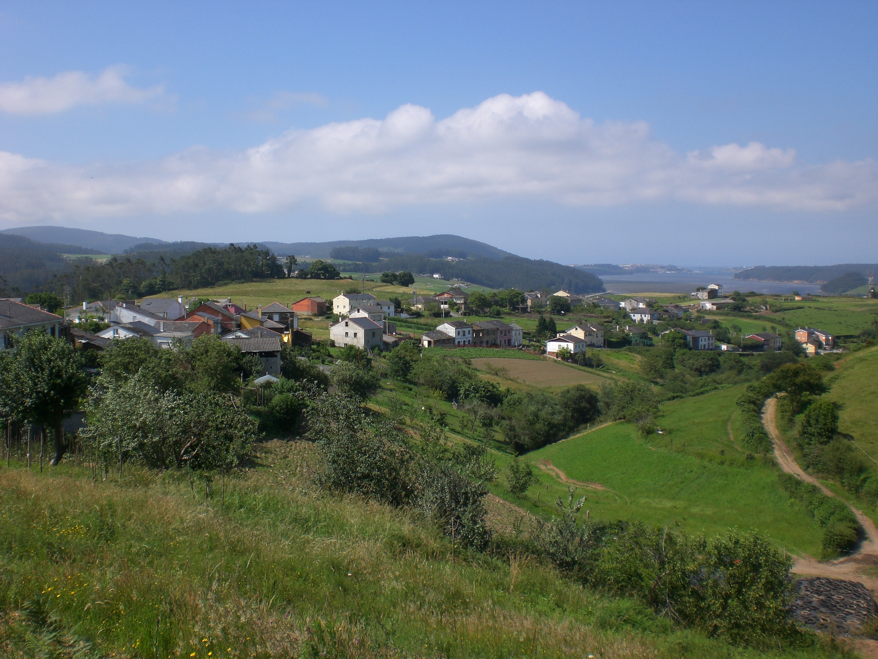 Vista del pueblo de Miou, en Vegadeo (Asturias)